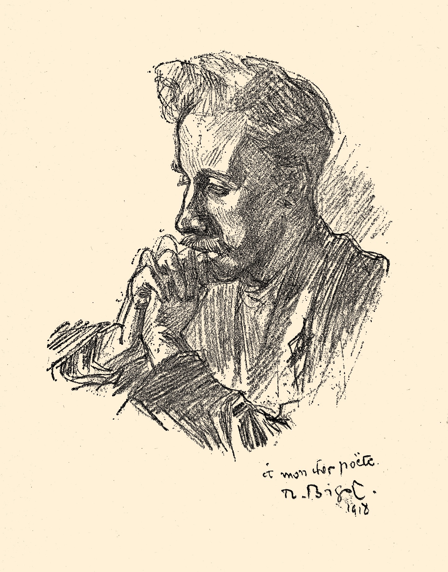 Portrait de Gaston Le Réverend.